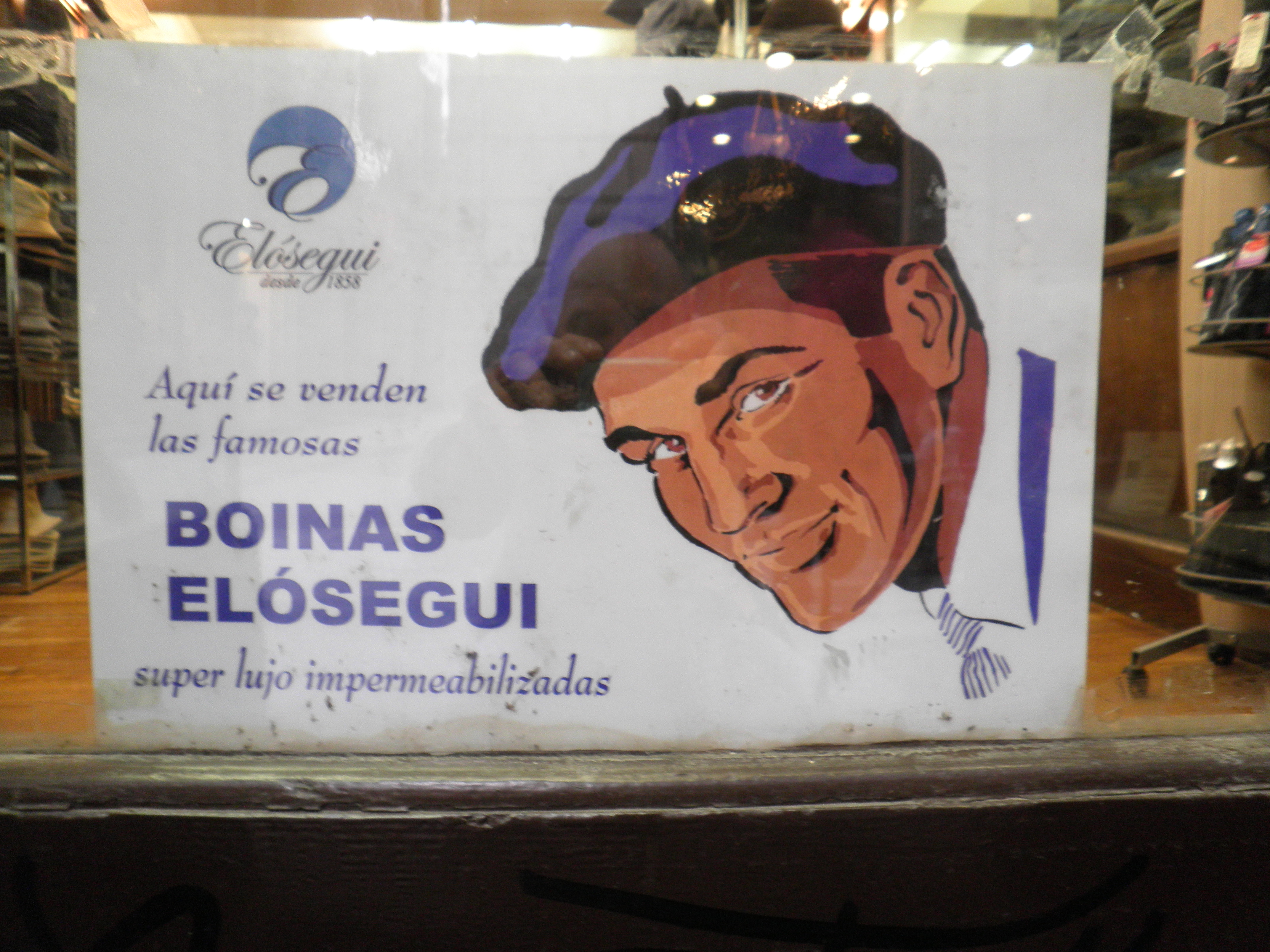 Boinas Elosegui enpresako iragarkia dedna bateko atarian.